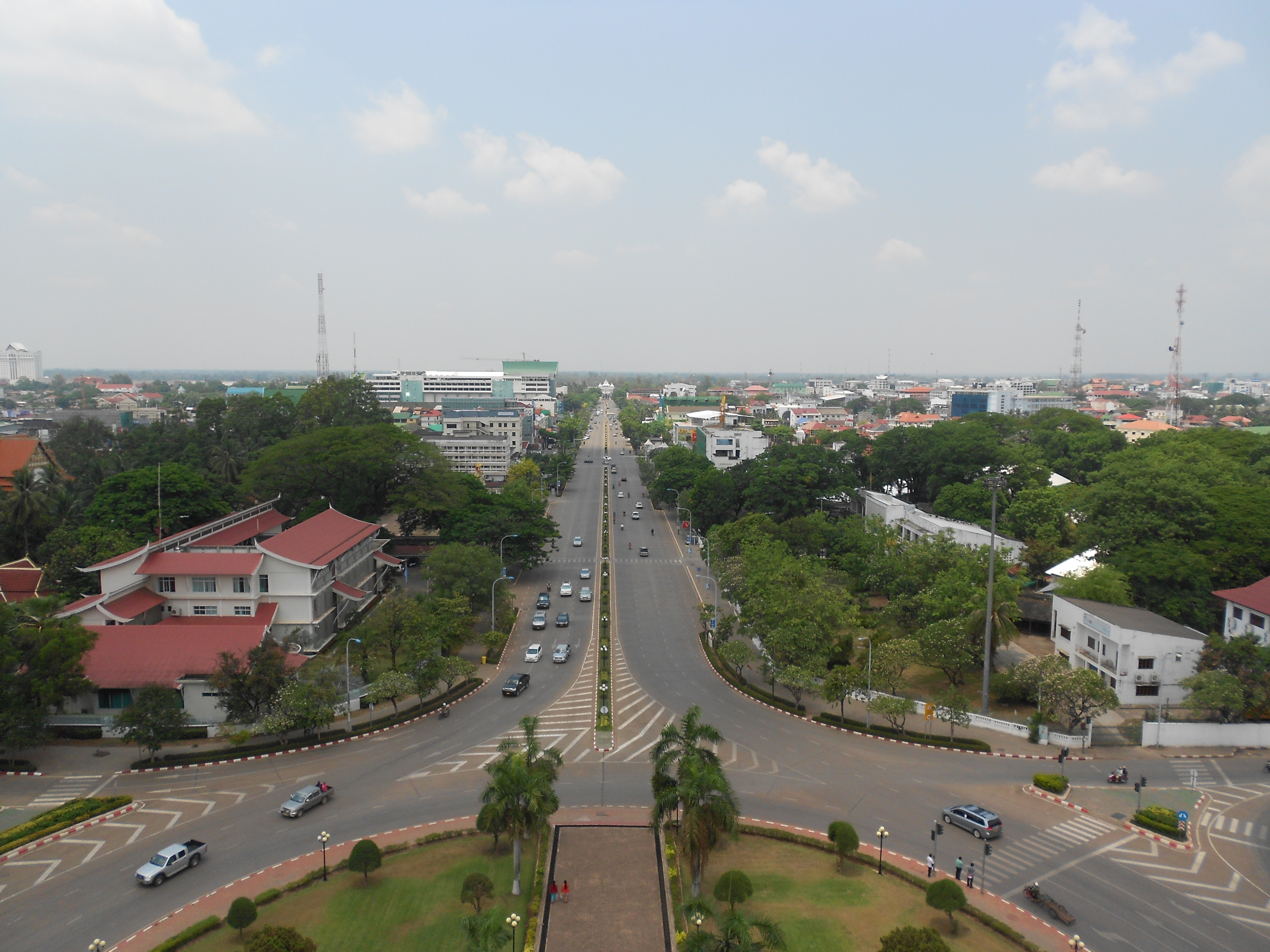 วิวตานกTemplate:En1=Bird's eye view